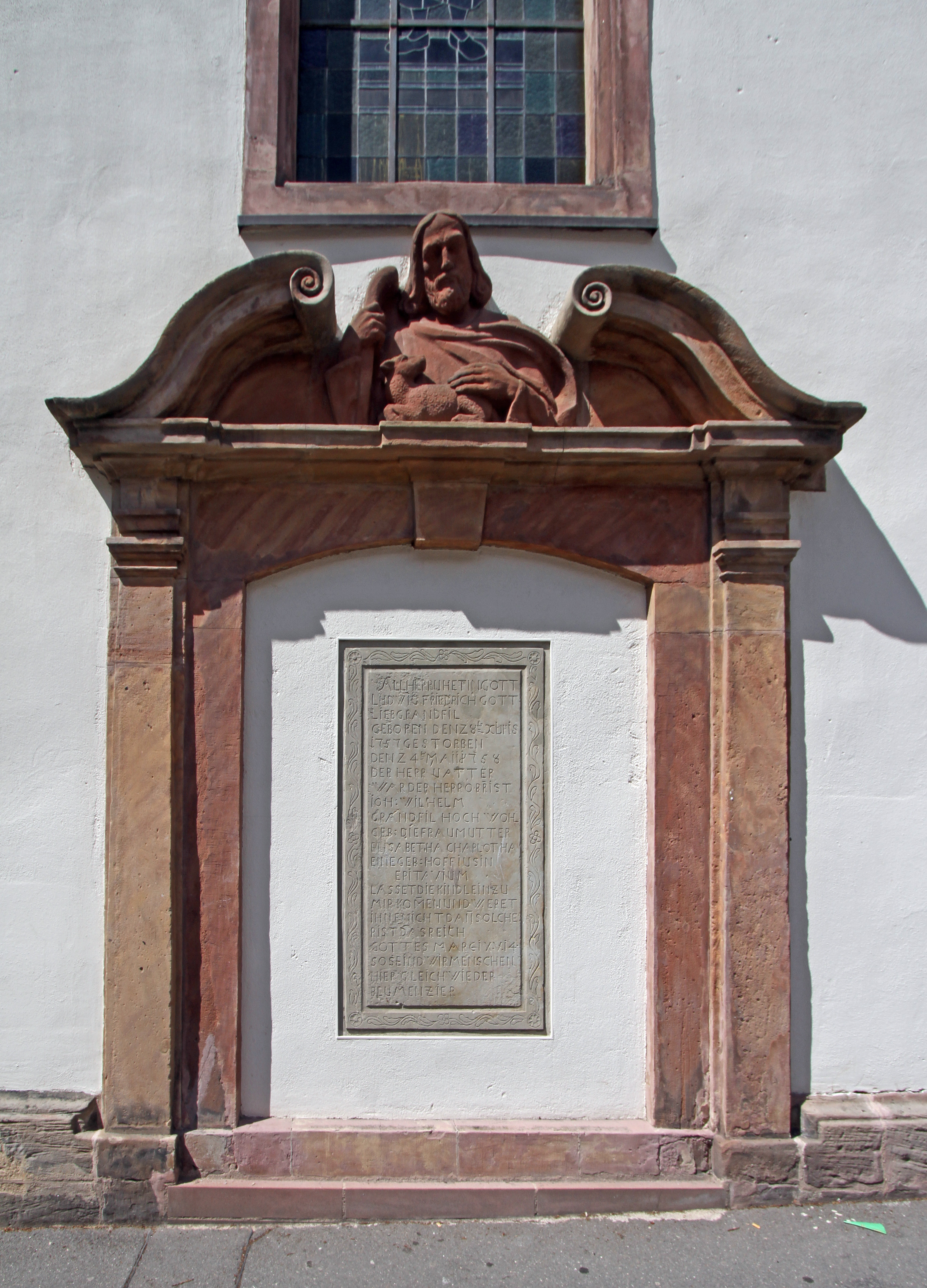 Portal mit Gedenktafel für Johann Wilhelm de Grandfil an der Johanneskirche in Pirmasens